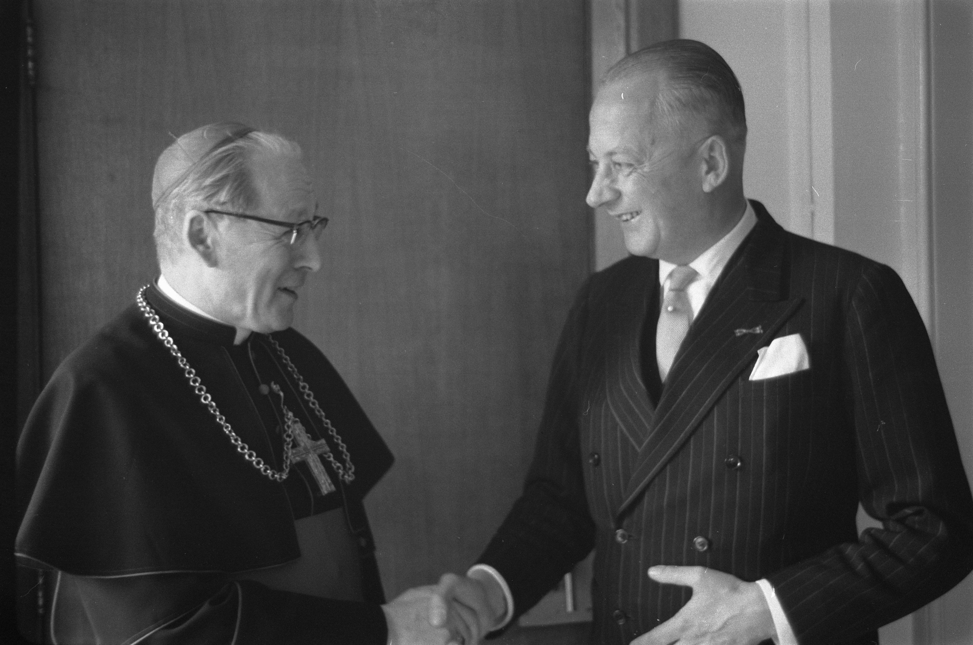 Collectie / Archief : Fotocollectie Anefo Reportage / Serie : [ onbekend ] Beschrijving : Burgemeester C. J. A. de Ranitz feliciteert kardinaal Alfrink Datum : 3 maart 1960 Trefwoorden : burgemeesters Persoonsnaam : Alfrink, Bernardus, C. J. A. de Ranilz Fotograaf : Pot, Harry / Anefo Auteursrechthebbende : Nationaal Archief Materiaalsoort : Negatief (zwart/wit) Nummer archiefinventaris : bekijk toegang 2.24.01.05 Bestanddeelnummer : 911-0640